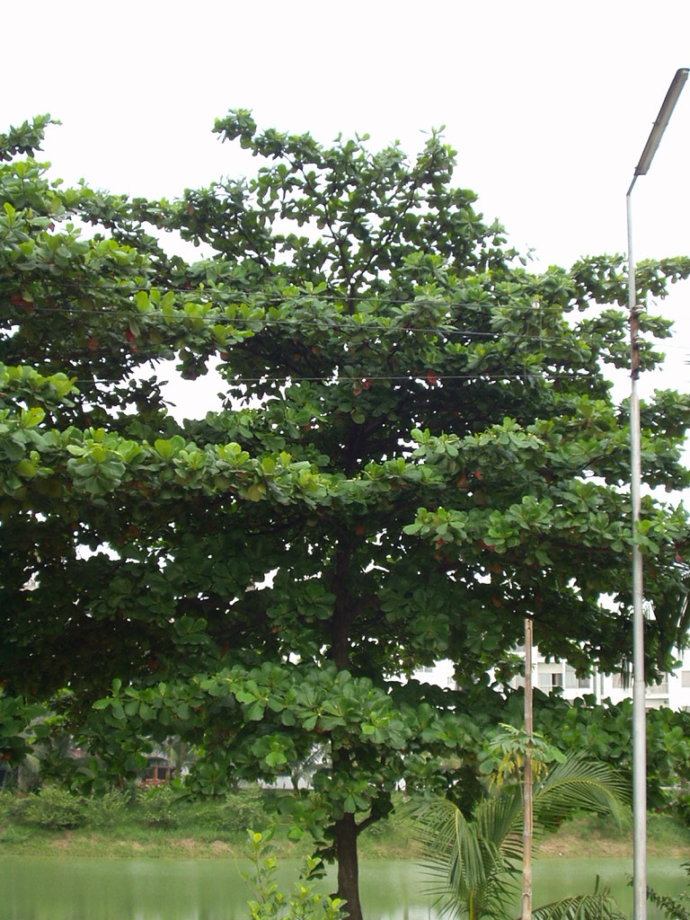 kath badam tree.